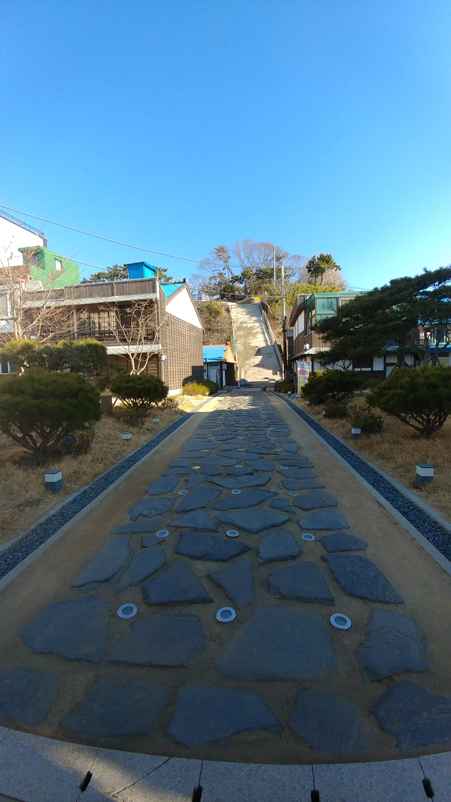 구룡포 일본인 거리